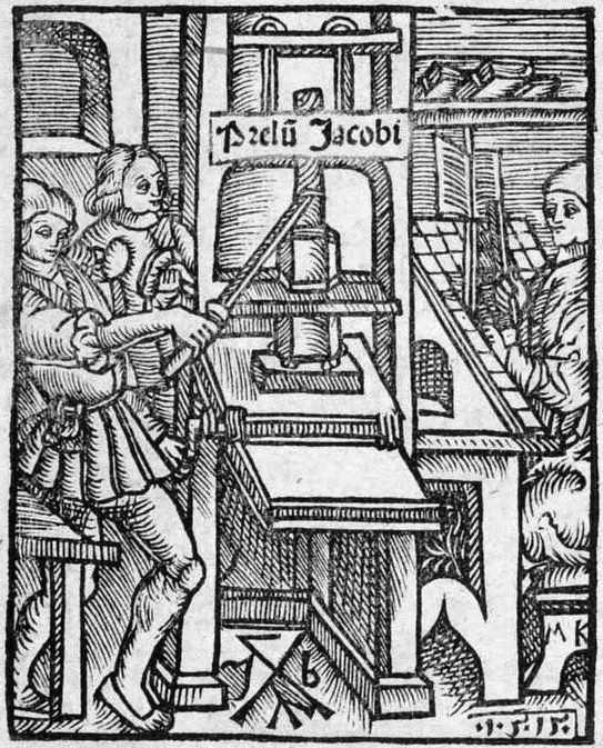 Drukkersmerk van Jacob van Breda uit Deventer van 1515, waarop een boekdrukpers is weergegeven.